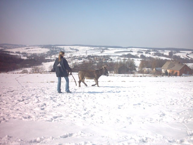 Widok na Brzeźnicę (gm. Bochnia) od strony przysiółka Kiebło. Brzeźnica